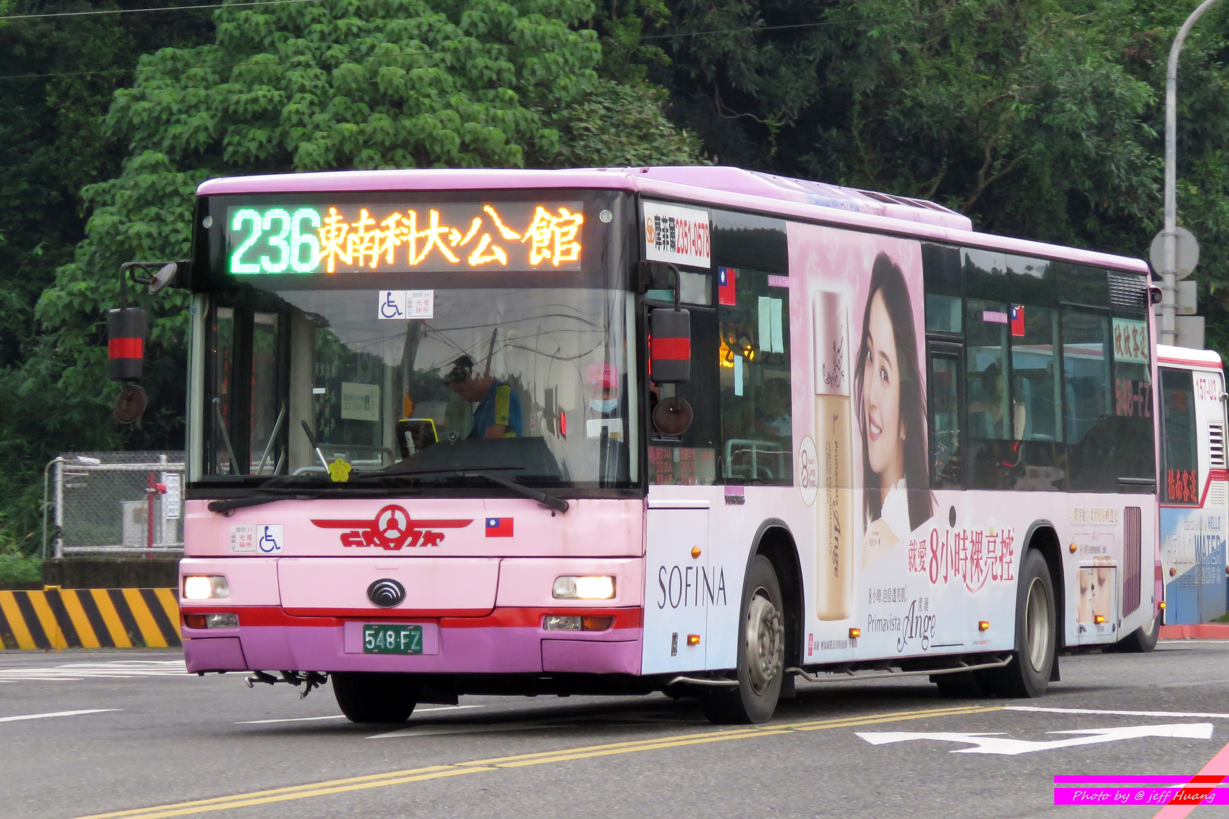 臺北聯營公車236路線(區間車)